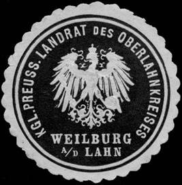 Sealing stamp Title: Königlich Preussischer Landrat des Oberlahnkreises Weilburg an der Lahn Description: schwarz, weiß, geprägt Place: Weilburg / Lahn size: 4 cm